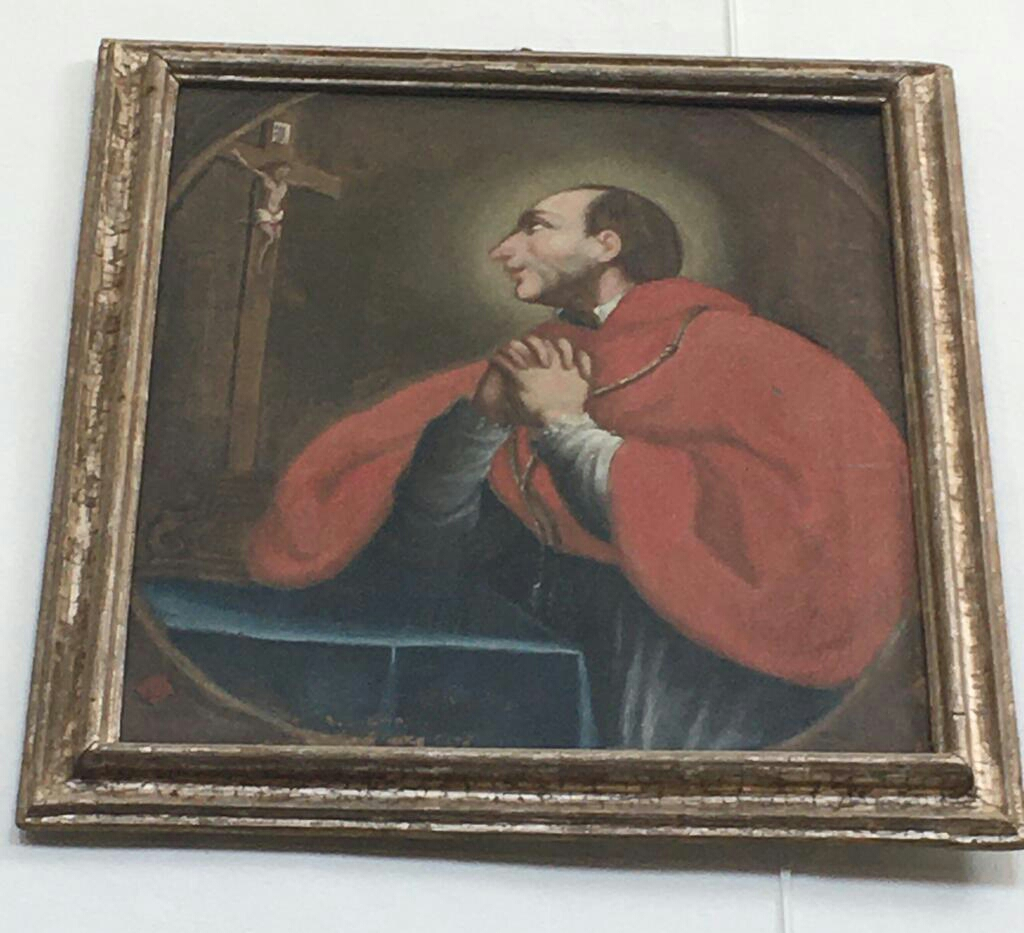 Ritratto di San Carlo Borromeo situato nella sacrestia della basilica minore del Santissimo Rosario, a Francavilla Fontana.